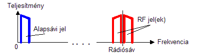 Alapsávi és RF jelek teljesítménysűrűsége (Visio ábra)